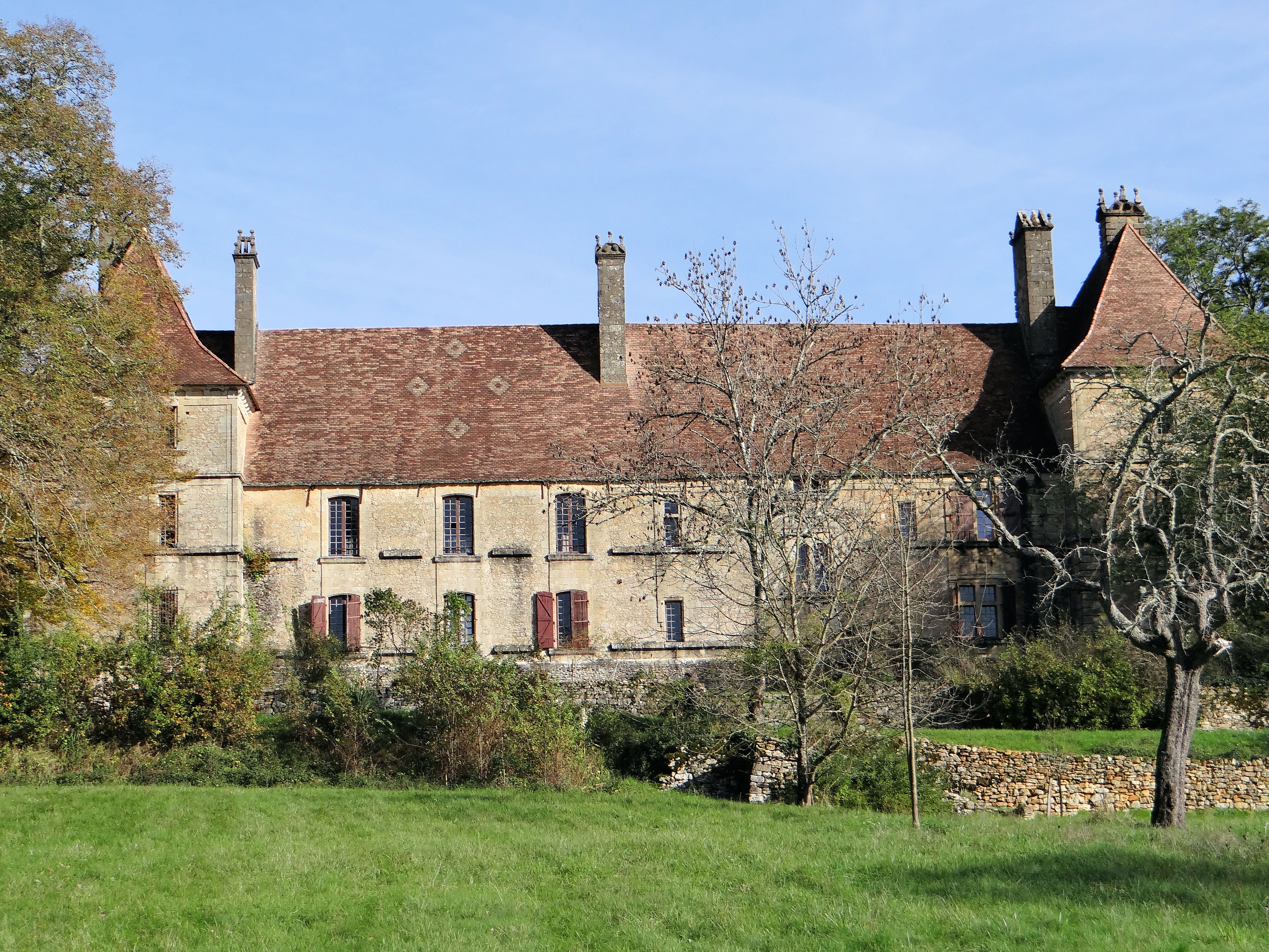 Château de Besse - Façade occidentale